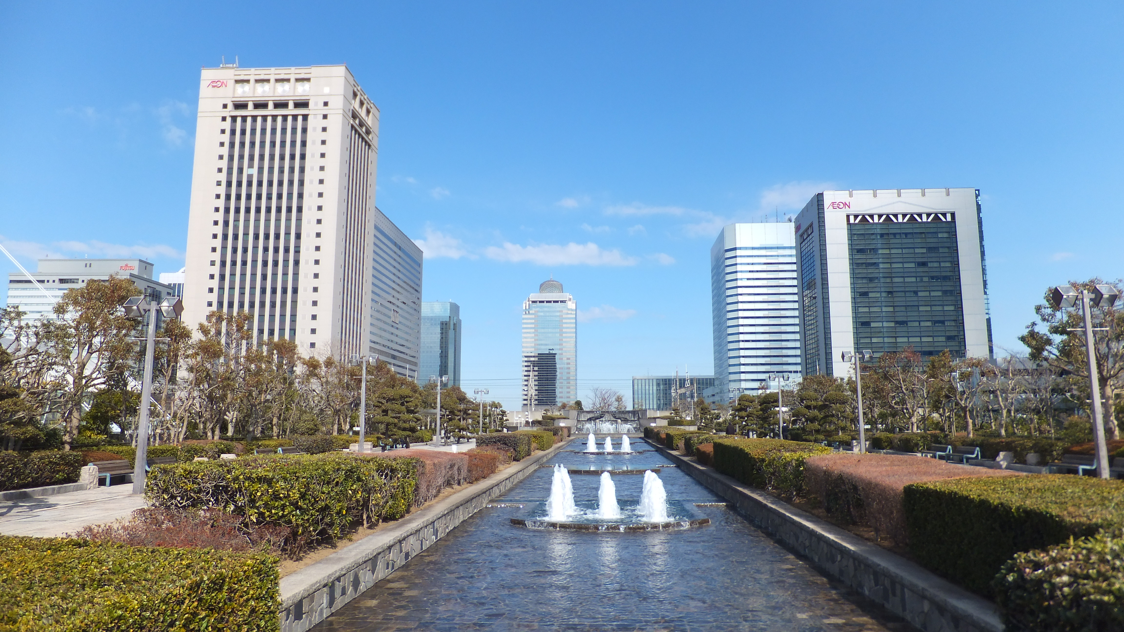 幕張メッセ前から見た幕張新都心業務研究地区